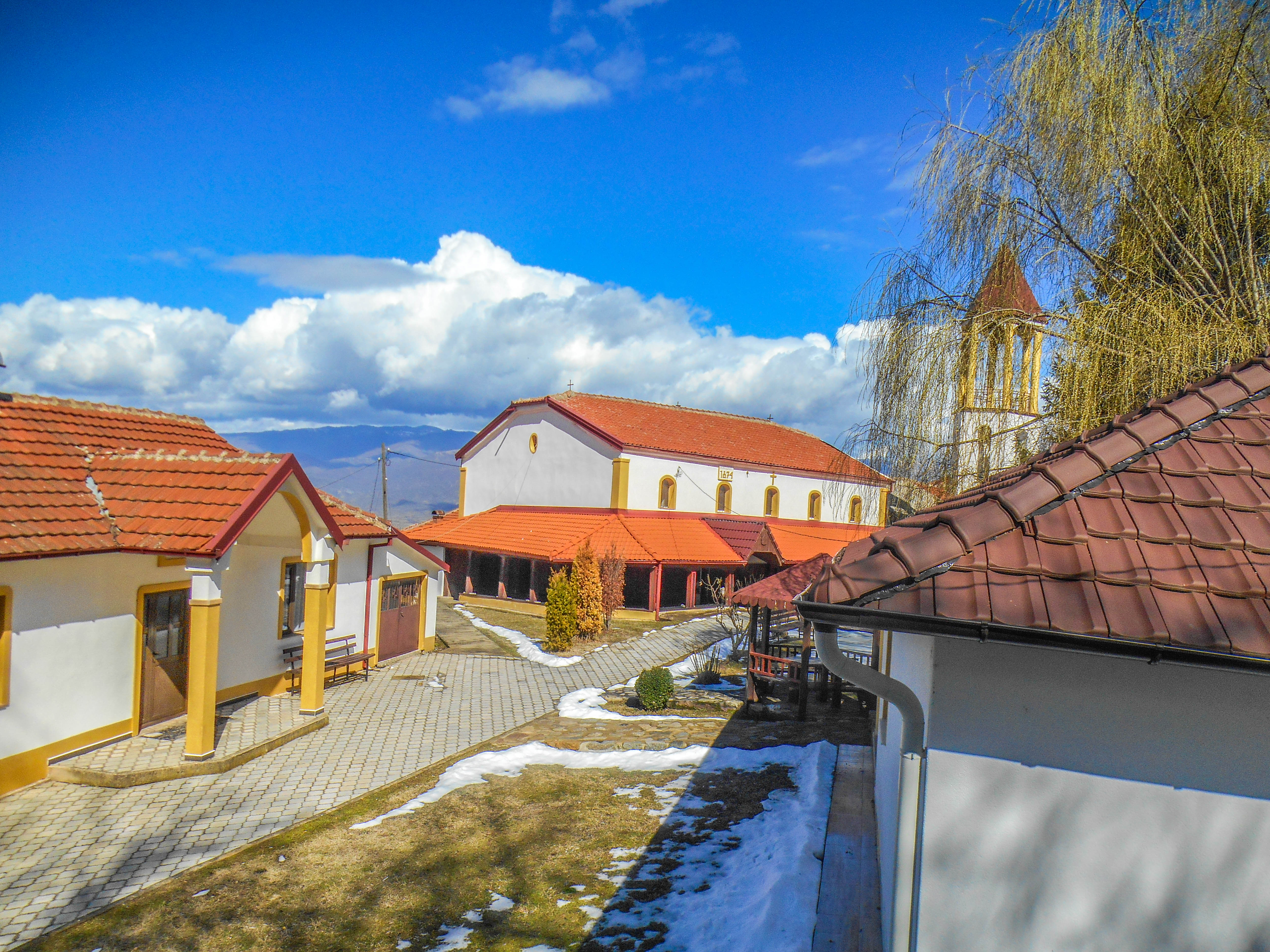 Црква „Св. Пантелејмон“ - Мокриево